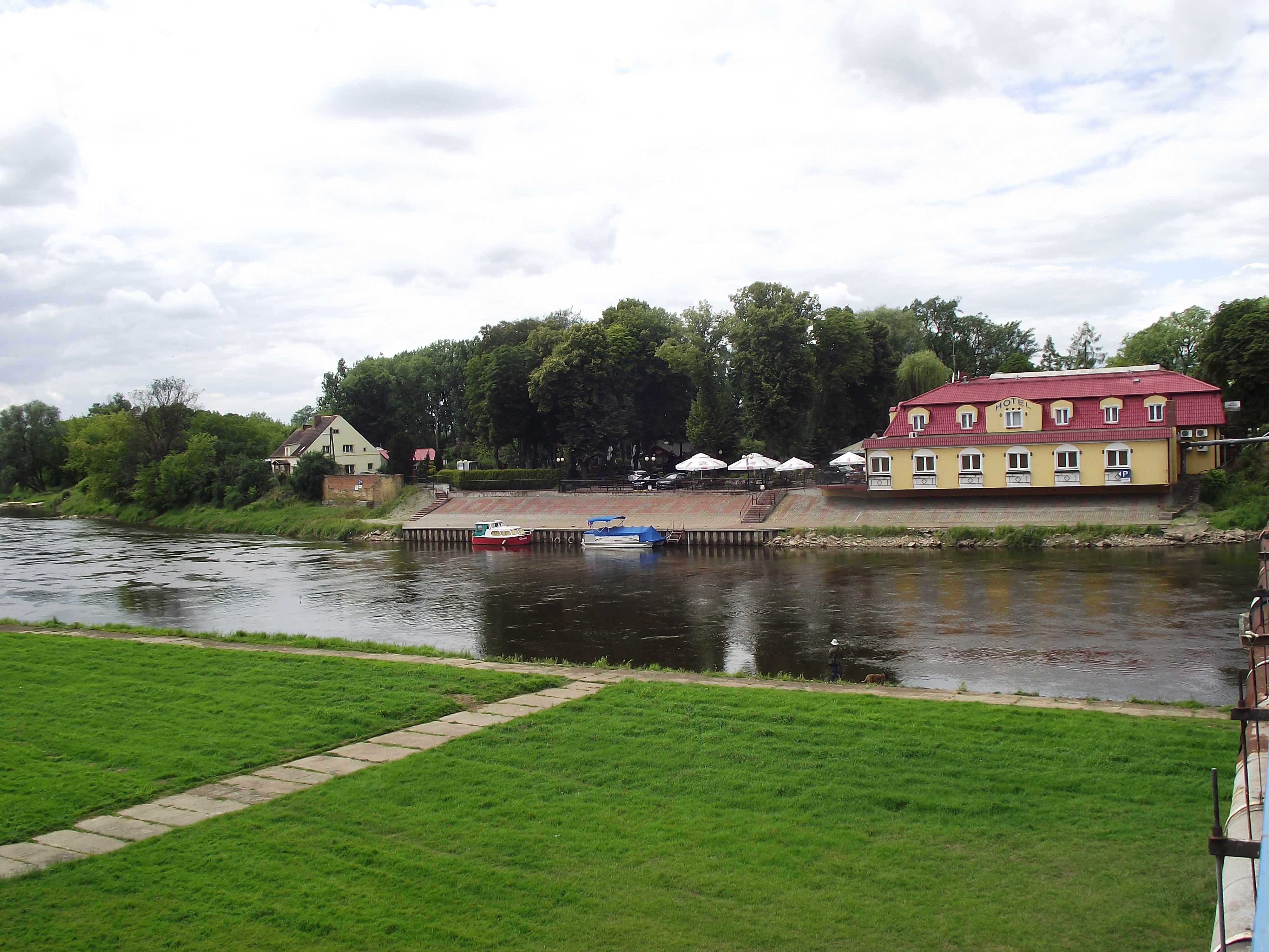 Skwierzyna - hotel nad Wartą